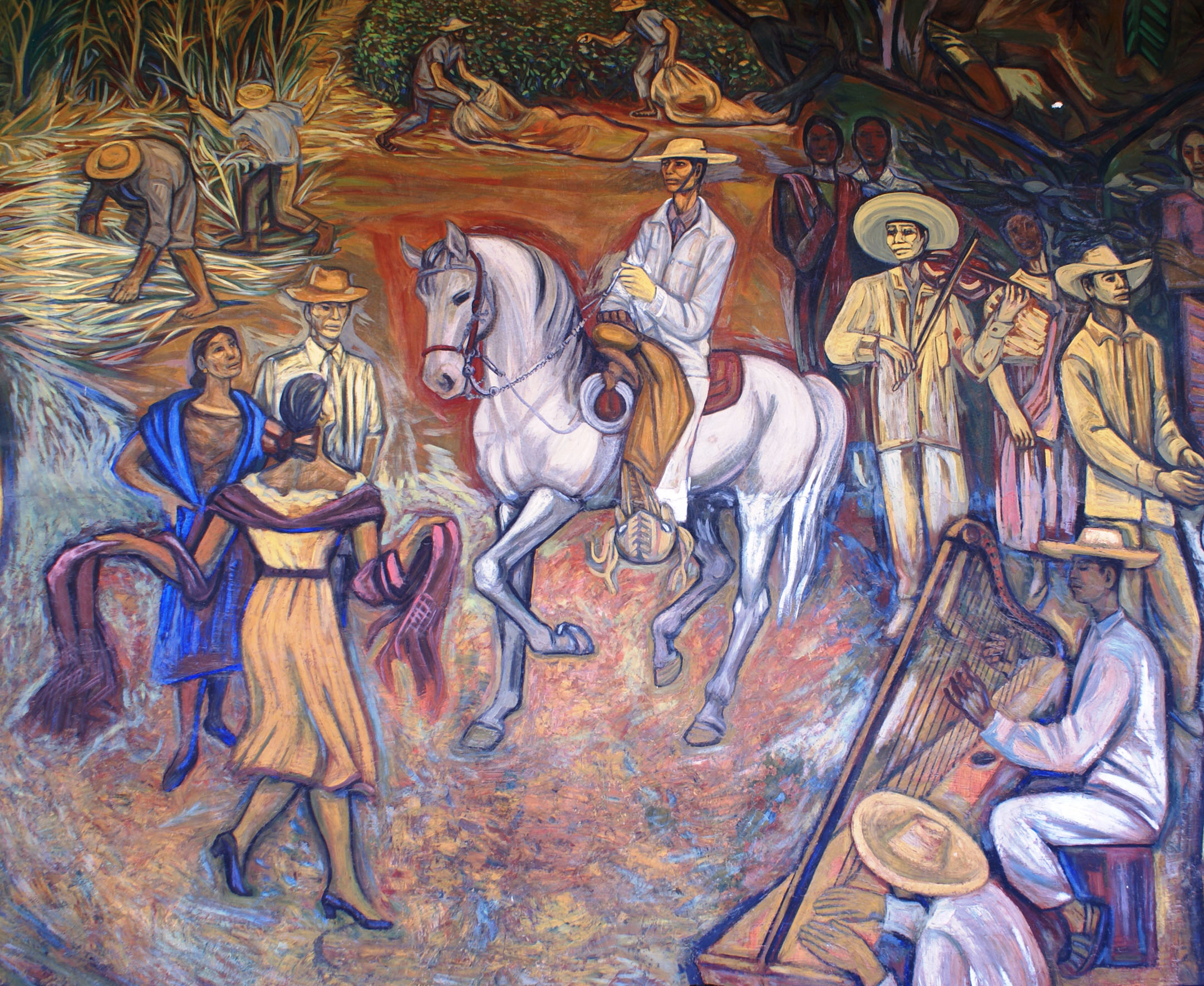 Fragmento de pintura mural Titulo del mural: “Gente y paisaje de Michoacán” Autor: Alfredo Zalce Año: 1962 Ubicación: Palacio de Gobierno de Michoacán Morelia, Michoacán, México.